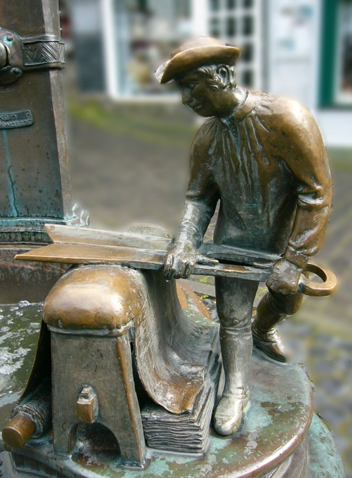 Historischer Tuchscherer bei der Handarbeit